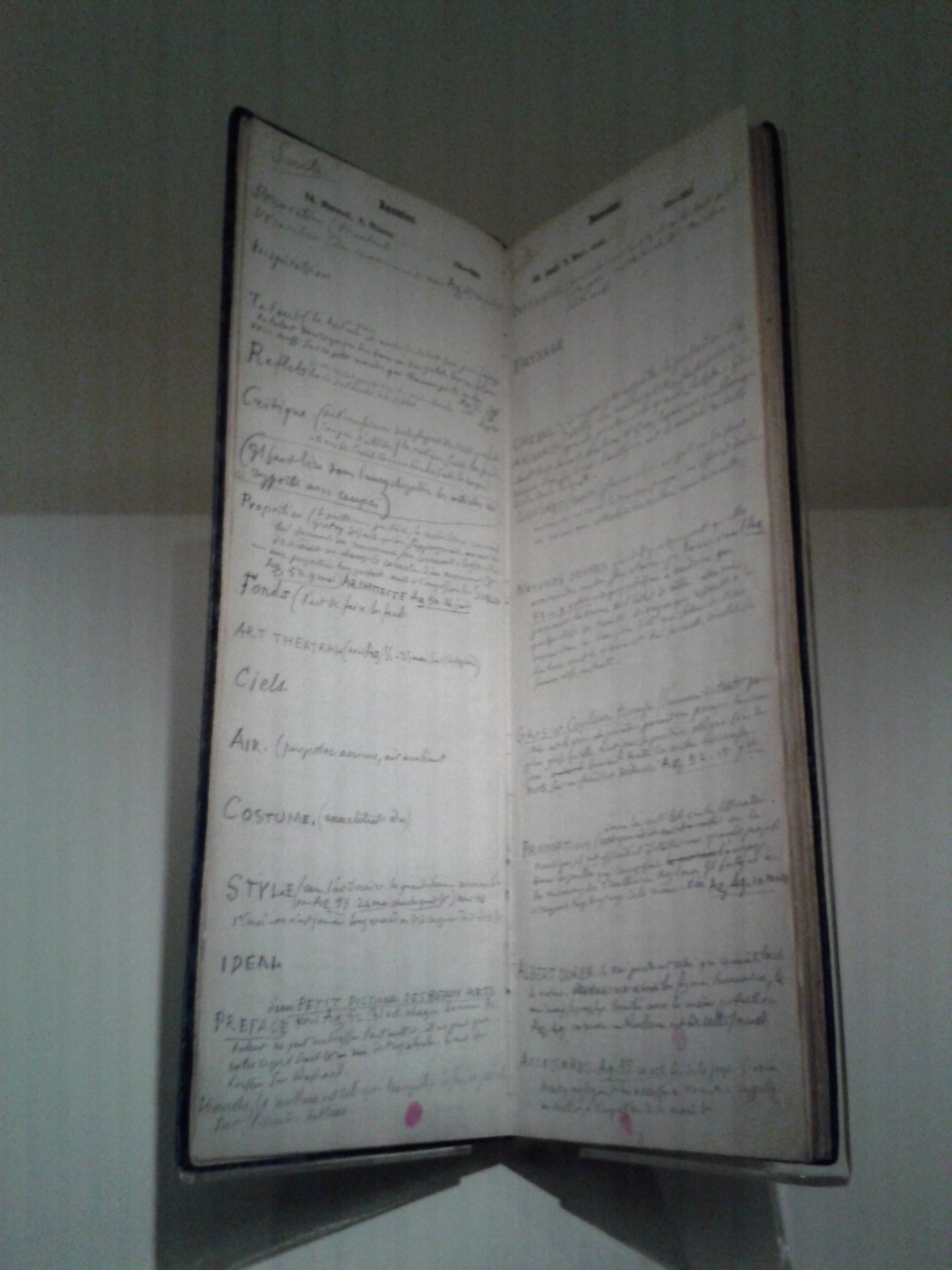 Manuscrit au crayon du Dictionnaire des Beaux-Arts d'Eugène Delacroix